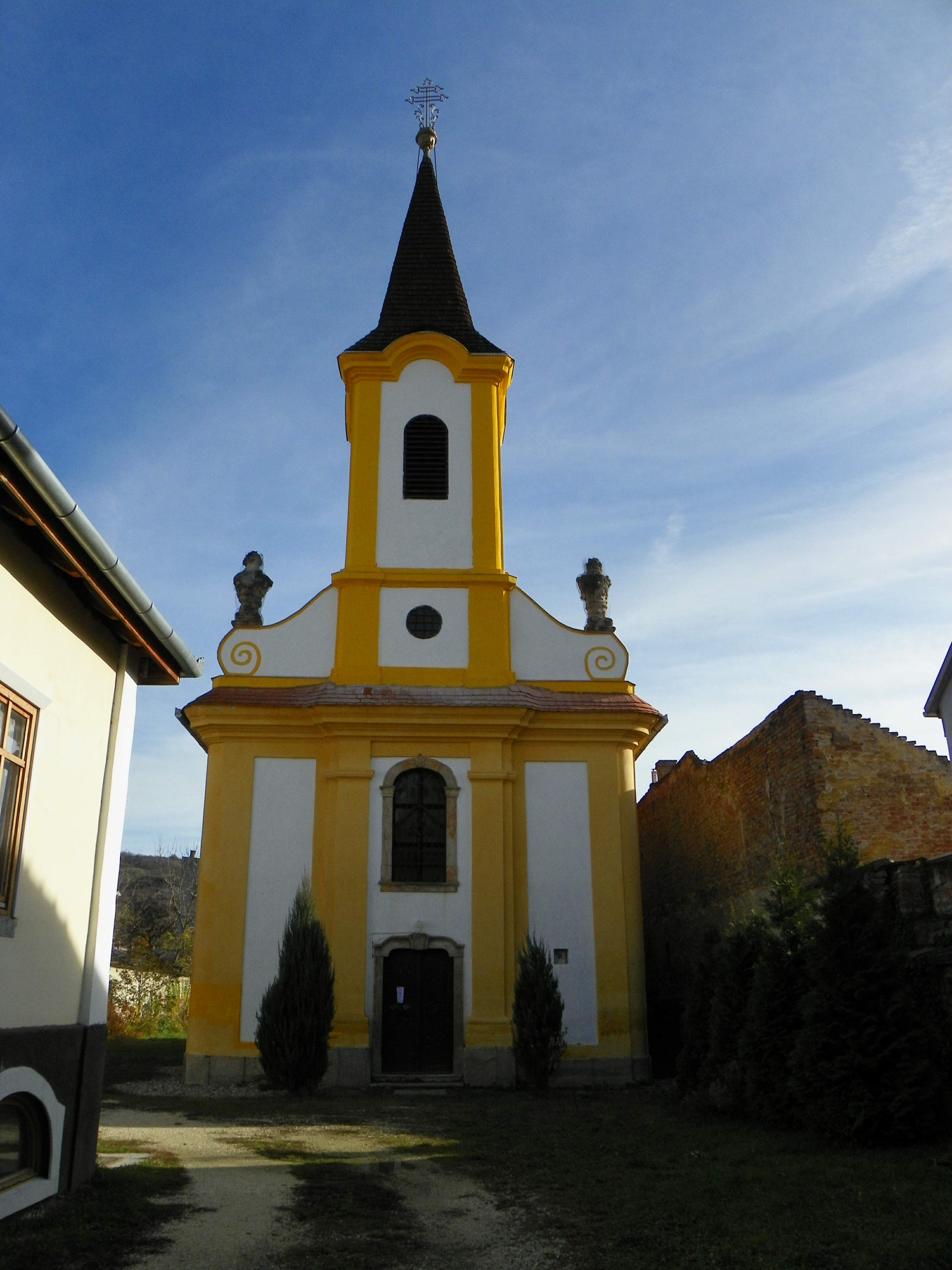 Az esztergomi Szent Mihály-templom, görög katolikus templom, (1910-ig szerb ortodox templom) vagy helyi nevén a rác templom. A rácok korábbi, fából épült temploma helyén épült 1765-1774 között. Műemlék. - Komárom-Esztergom megye, Esztergom, Kossuth Lajos utca 60.